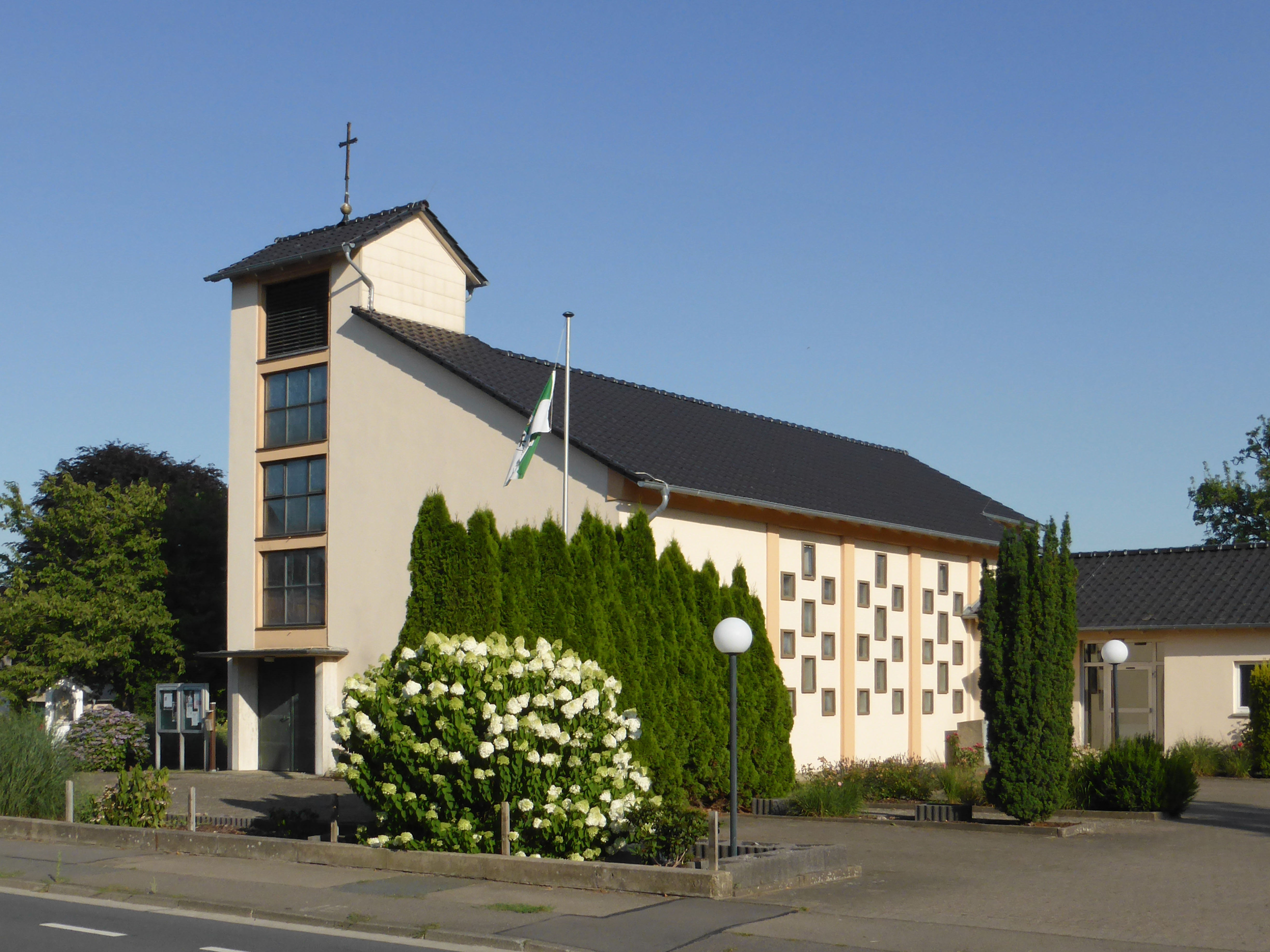 Kath. Kirche in Bokeloh.